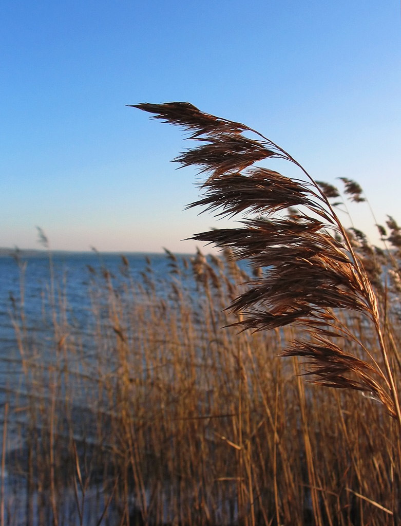 Beschreibung: Schilfrohr (Phragmites australis) Fotograf: Darkone, 15. Dezember 2004